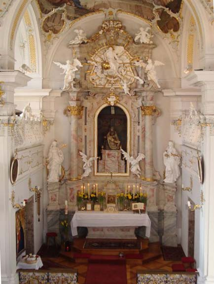 Wallfahrtskirche_Mentlberg_2